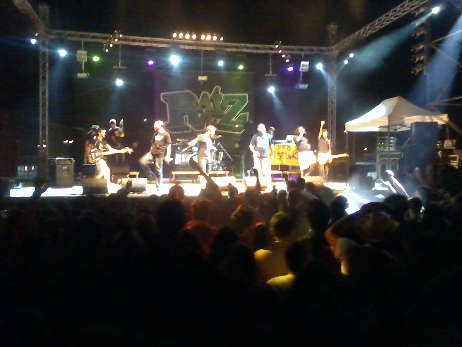 Concert del grup valencià La Raíz el 22 de juny de 2014 a Reus (Catalunya).